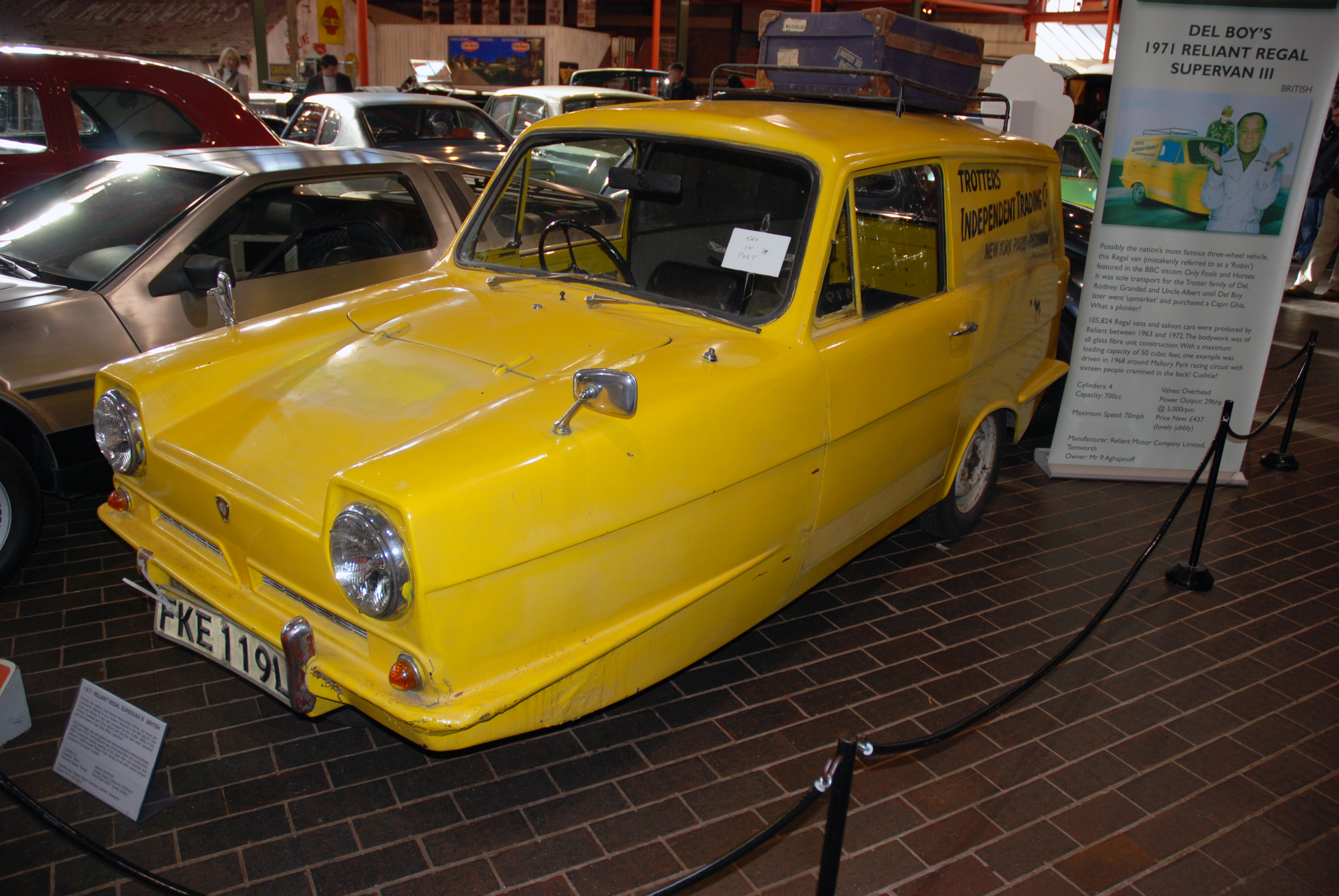 National Motor Museum,Beaulieu,Nov2007